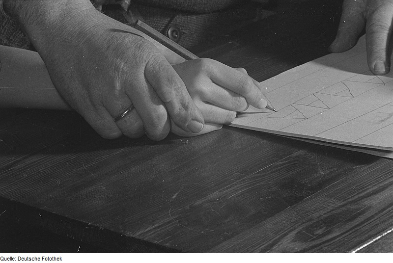 Original image description from the Deutsche Fotothek Bild Eine Frauenhand führt eine Kinderhand beim Schreiben eines As im Dr.-Georg-Sacke-Heim